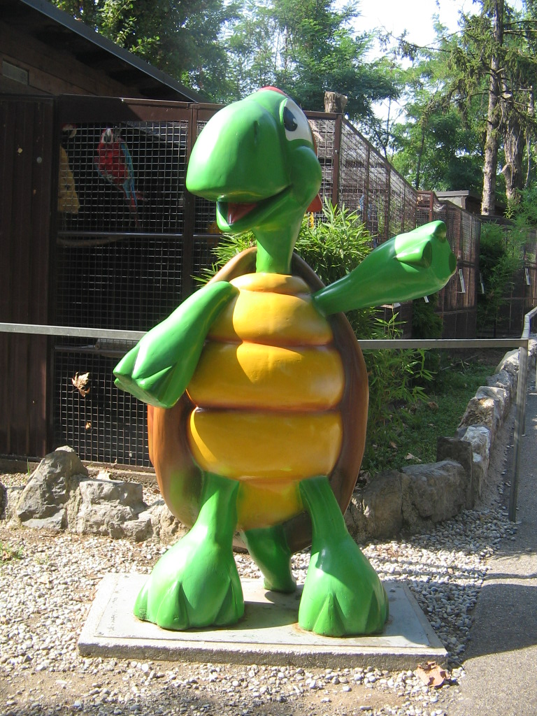 La Tartatura Gervasio, mascotte di FantasyWorld Minitalia